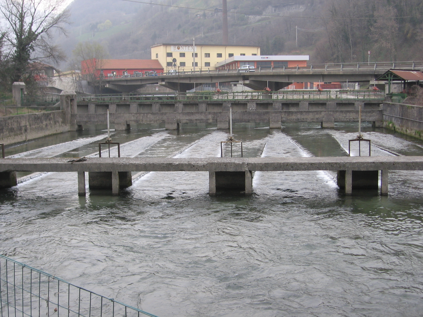 Colzate, Bergamo, Italia